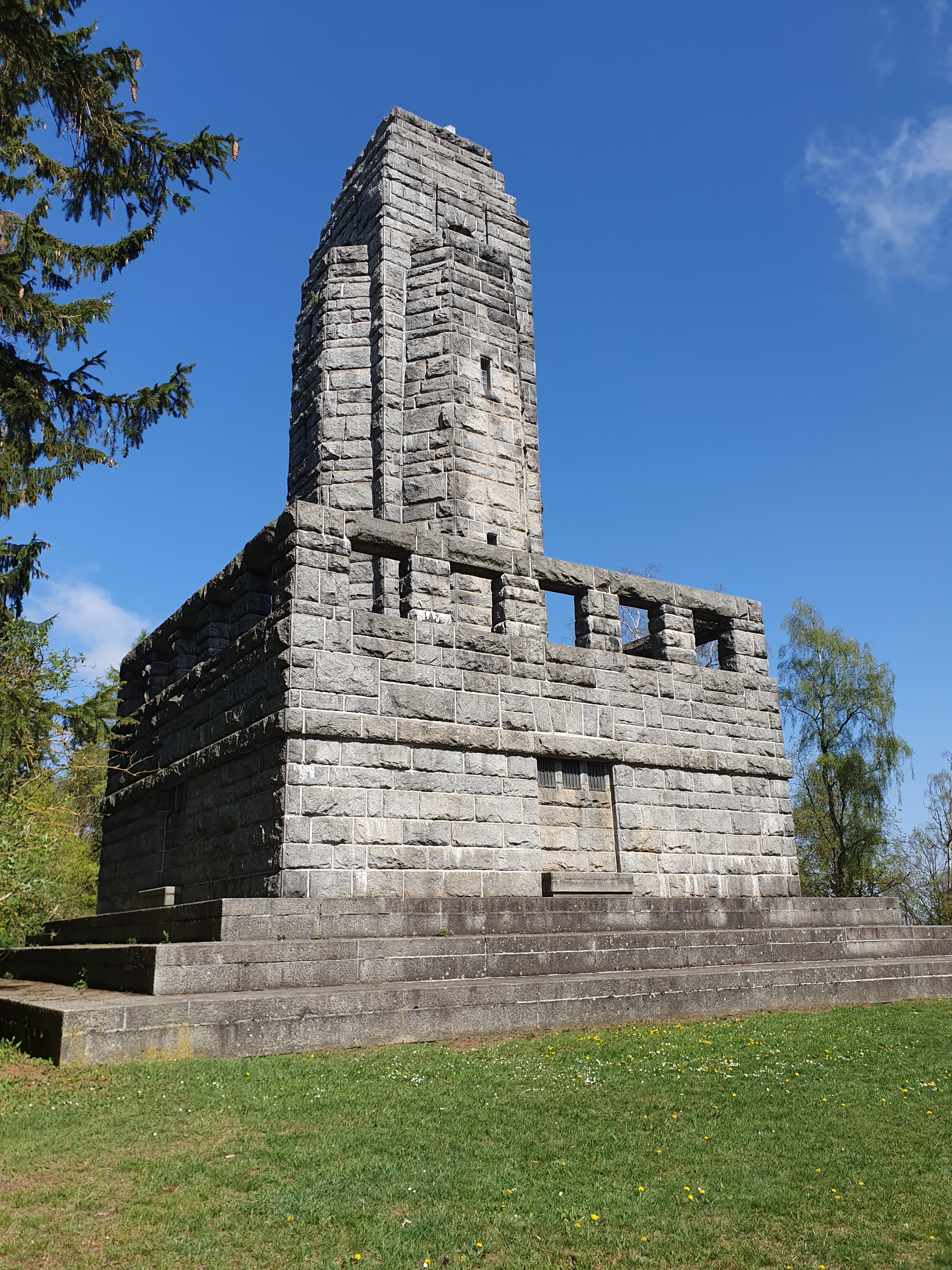 Ansicht vom Boden.